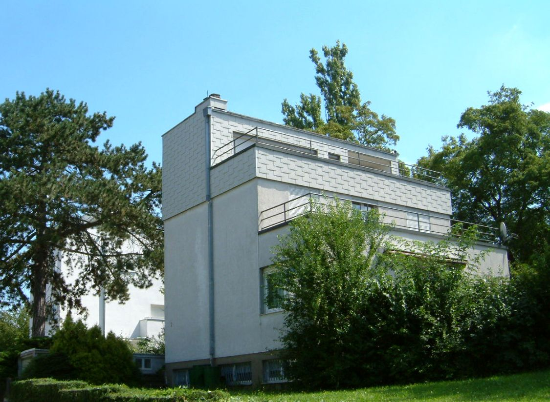 Arch. Peter Feile, Würzburg, Lerchenhain 2